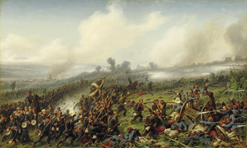 Schlachtszene, die entweder die Schlacht bei Weißenburg (4. August 1870) oder die Schlacht bei Wörth (6. August 1870) darstellt. Dargestellt sind das Leib-Grenadier-Regiment König Friedrich Wilhelm III. (1. Brandenburgisches) Nr. 8 und das Colbergsche Grenadier-Regiment Graf Gneisenau, sowie algerischen Kolonialtruppen (Zuaven) in französischen Diensten. Öl auf Leinwand, enstanden 1871, heute in Privatbesitz in Deutschland.